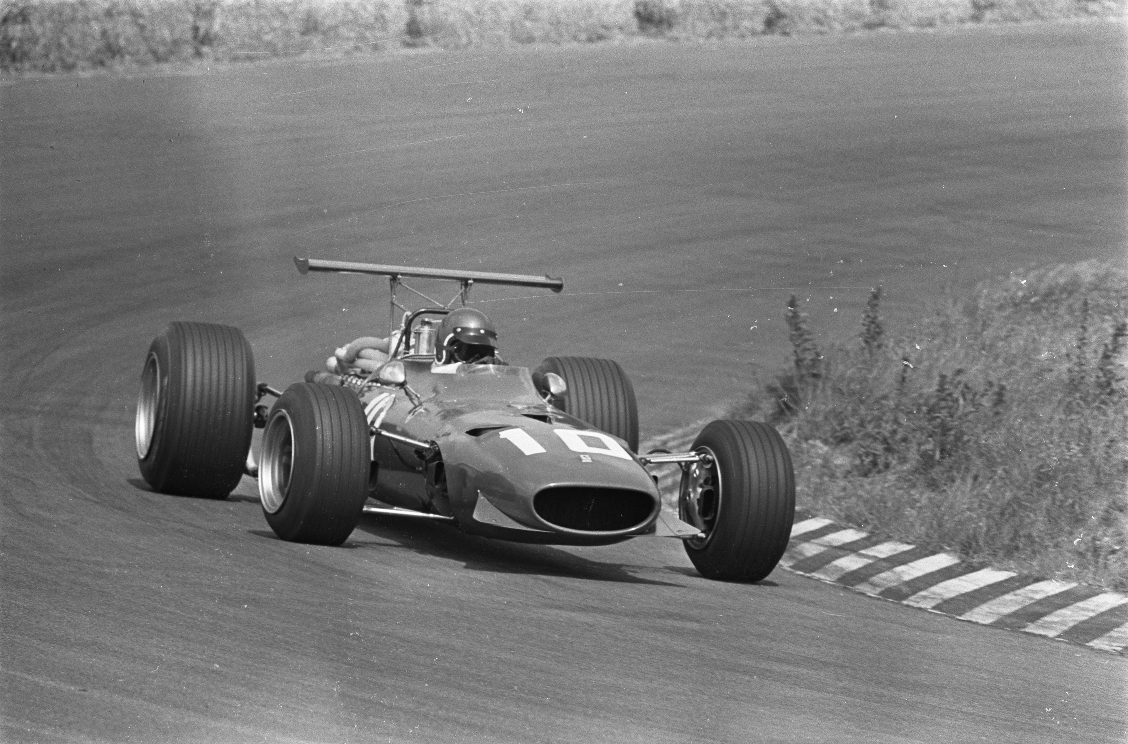 Grand Prix 68 Zandvoort . Nummers 13.15 Jackie Ickx , nummer 14 Jackie Stewart.